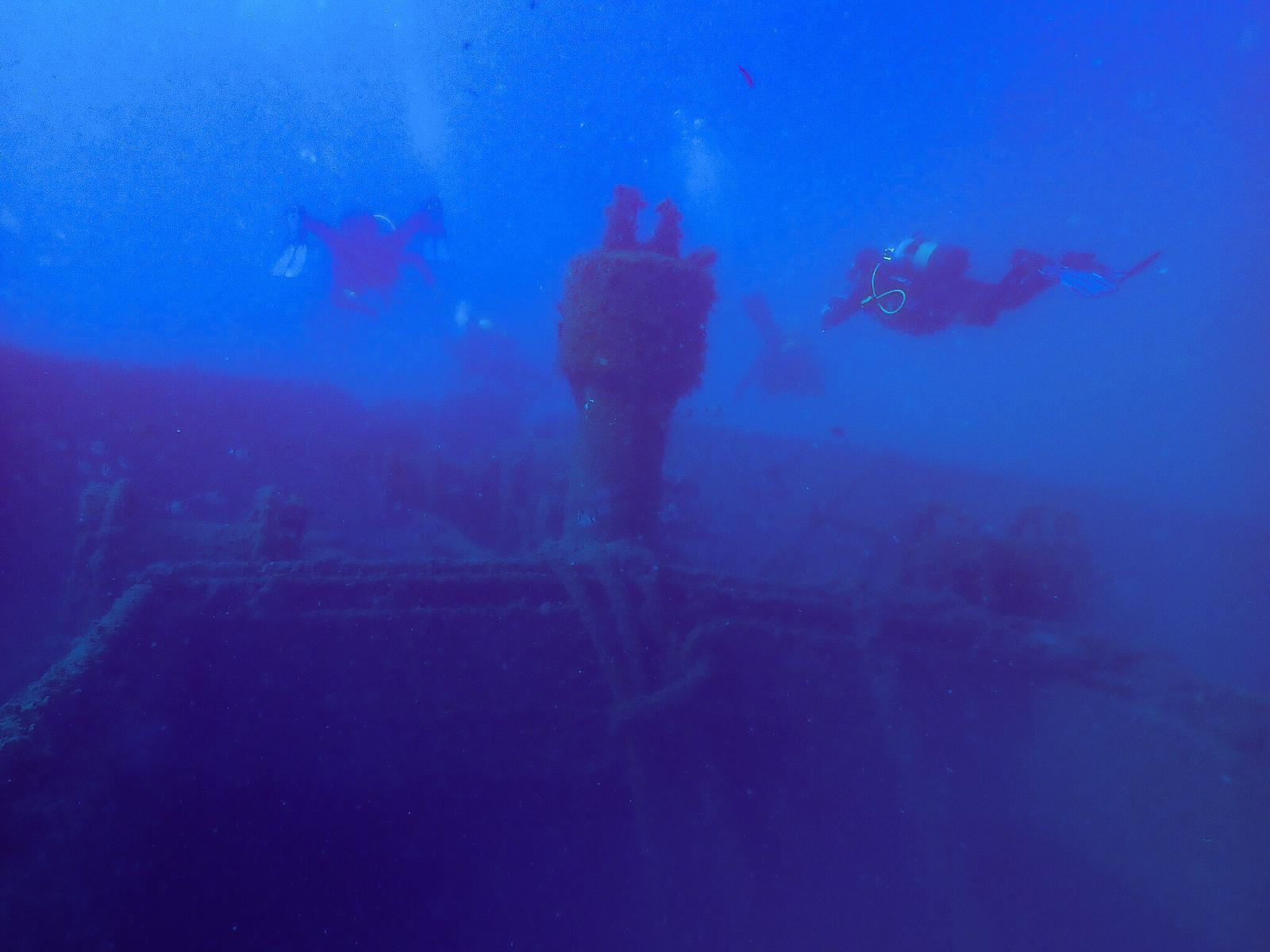 Imatge frontal del vaixell